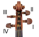 Isolation détail et ajout texte. ©éréales Kille® | | ☺ | en ce 23 mai 2006 à 18:40 (CEST)